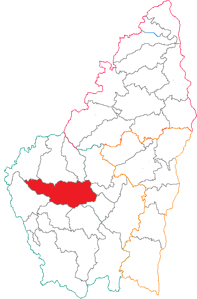 Situation du canton dans le département de l'Ardèche (France)